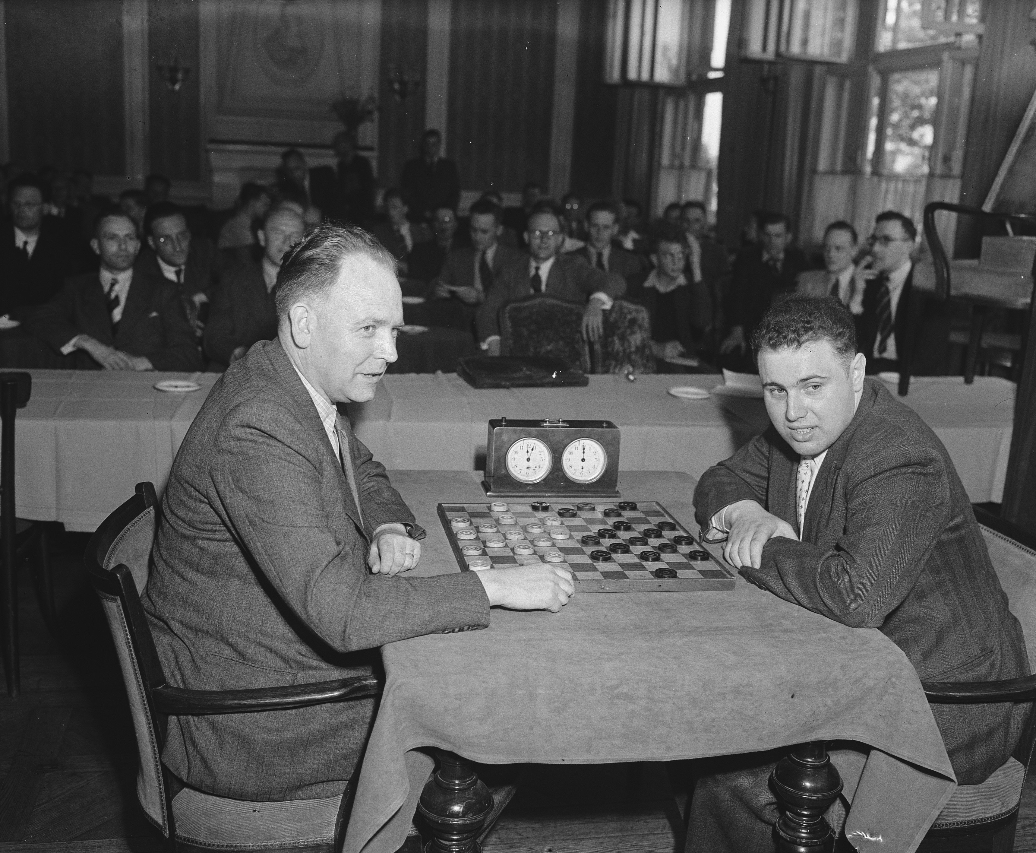 Wereldkampioen Dammen. De spelers R.C.Keller (links) en de Fransman Pierre Ghestem.